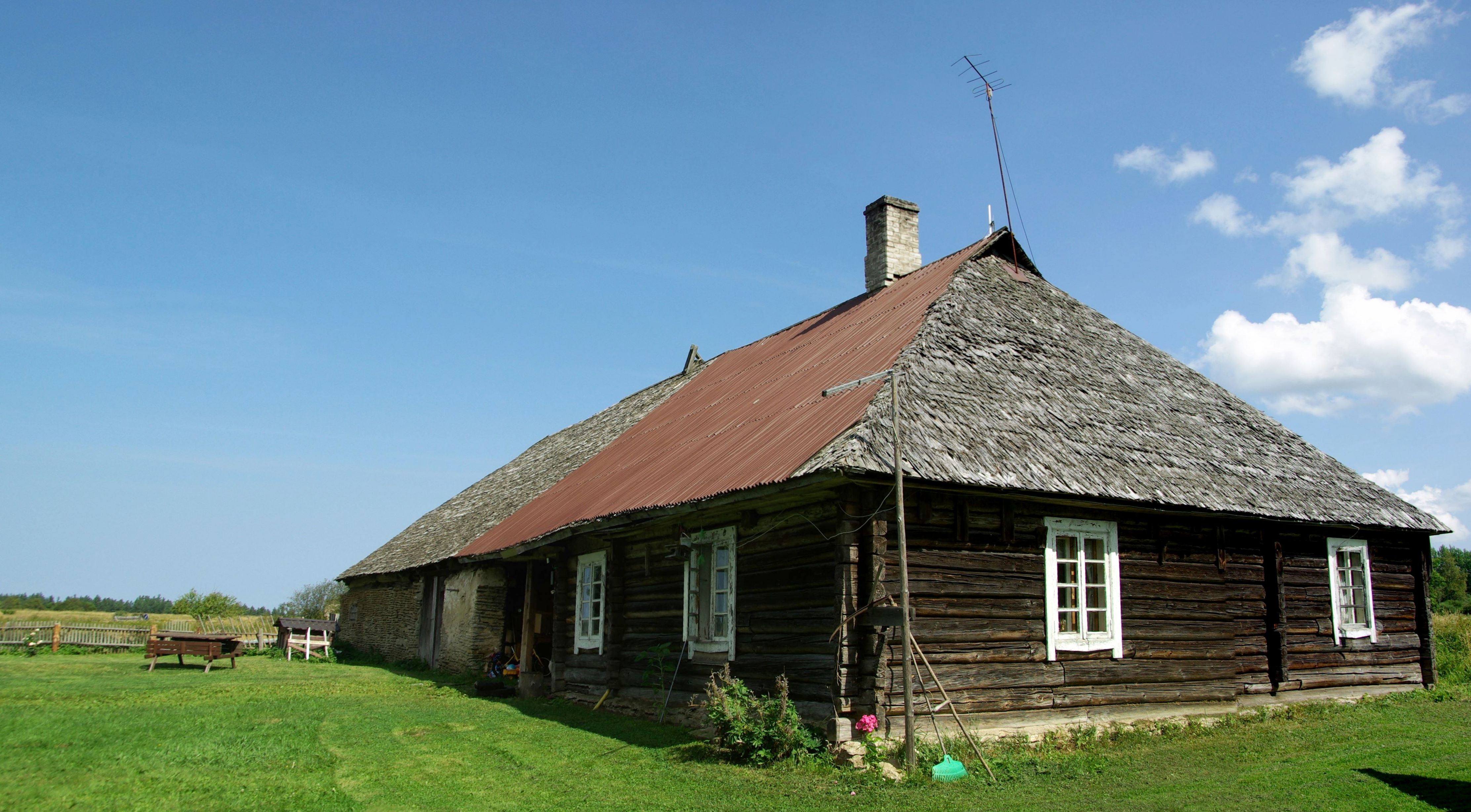 Hansurahva talu rehielamu